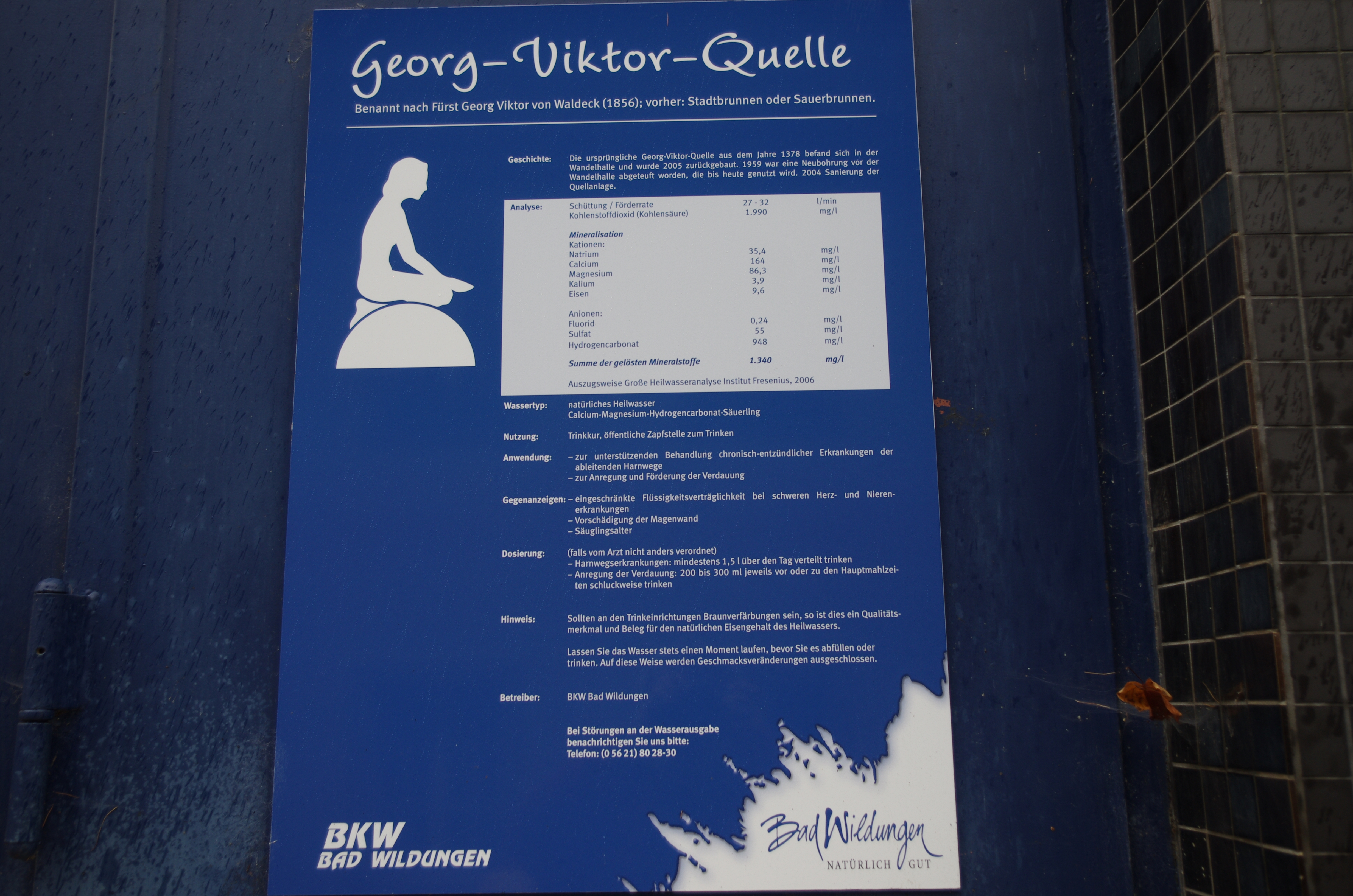 Bad Wildungen in Hessen. Die Informationstafel befindet sich an der Georg-Viktor-Quelle. Ähnliche Schilder befinden sich an den meisten anderen Quellen.